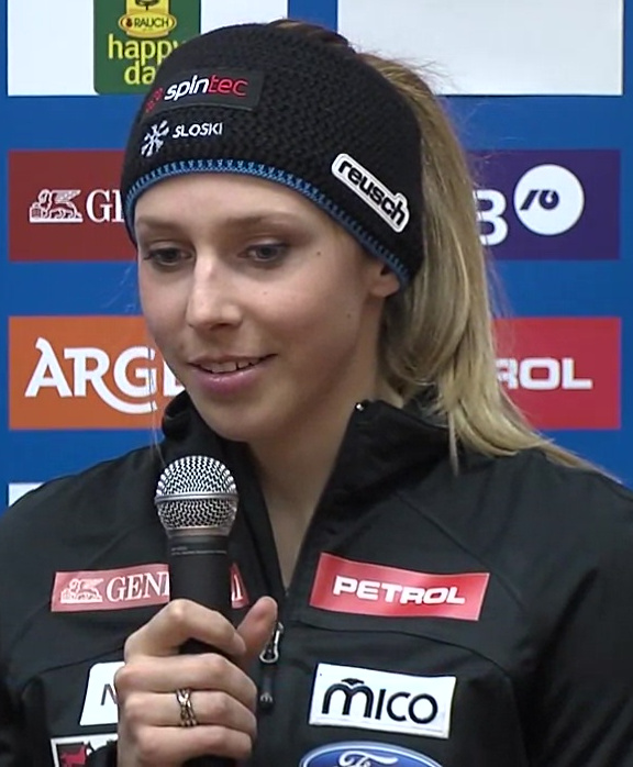 Ana Bucik